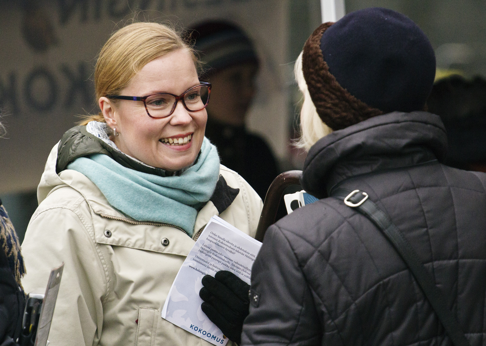 Sosiaali- ja terveysministeri Laura Räty keskustelemassa helsinkiläisten kanssa helmikuussa 2015.